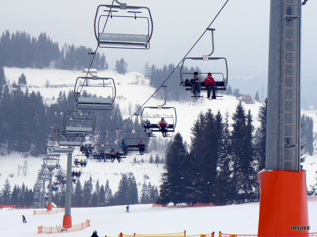 RusińSKI